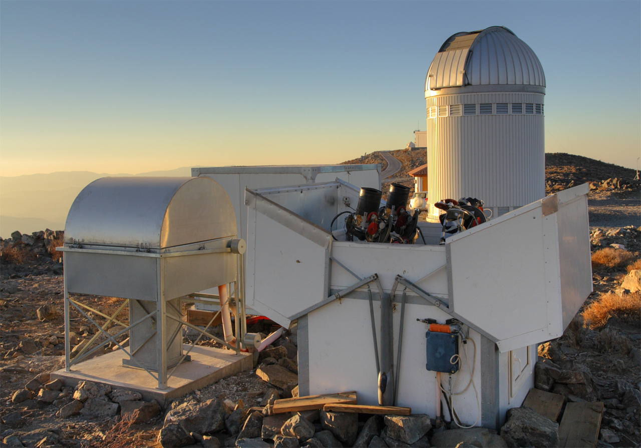 Teleskopy polskiego projektu "All Sky Automated Survey". W tle budynek, w którym znajduje się teleskop projektu OGLE. "All Sky Automated Survey" telescopes at Las Campanas Observatory. OGLE telescope visible in background.